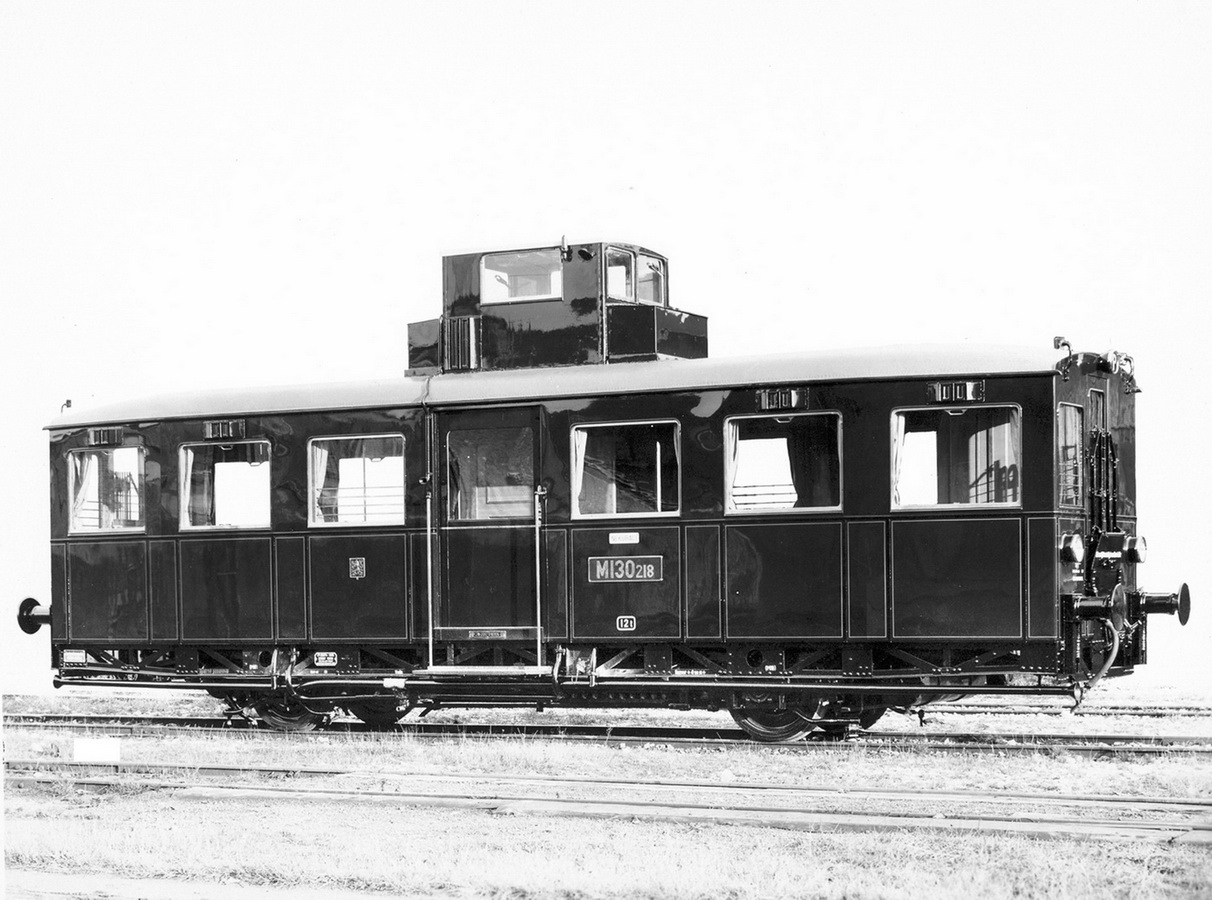 Werkfoto von Tatra des M 130.218